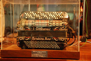 O acordeão de José Ferreiro (Pai),encontra-se exposto no Museu Etnográfico de Faro